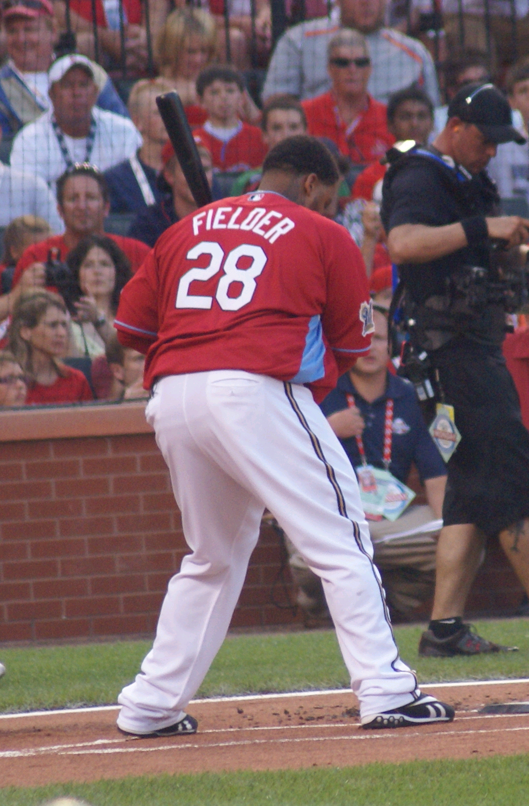 Prince Fielder